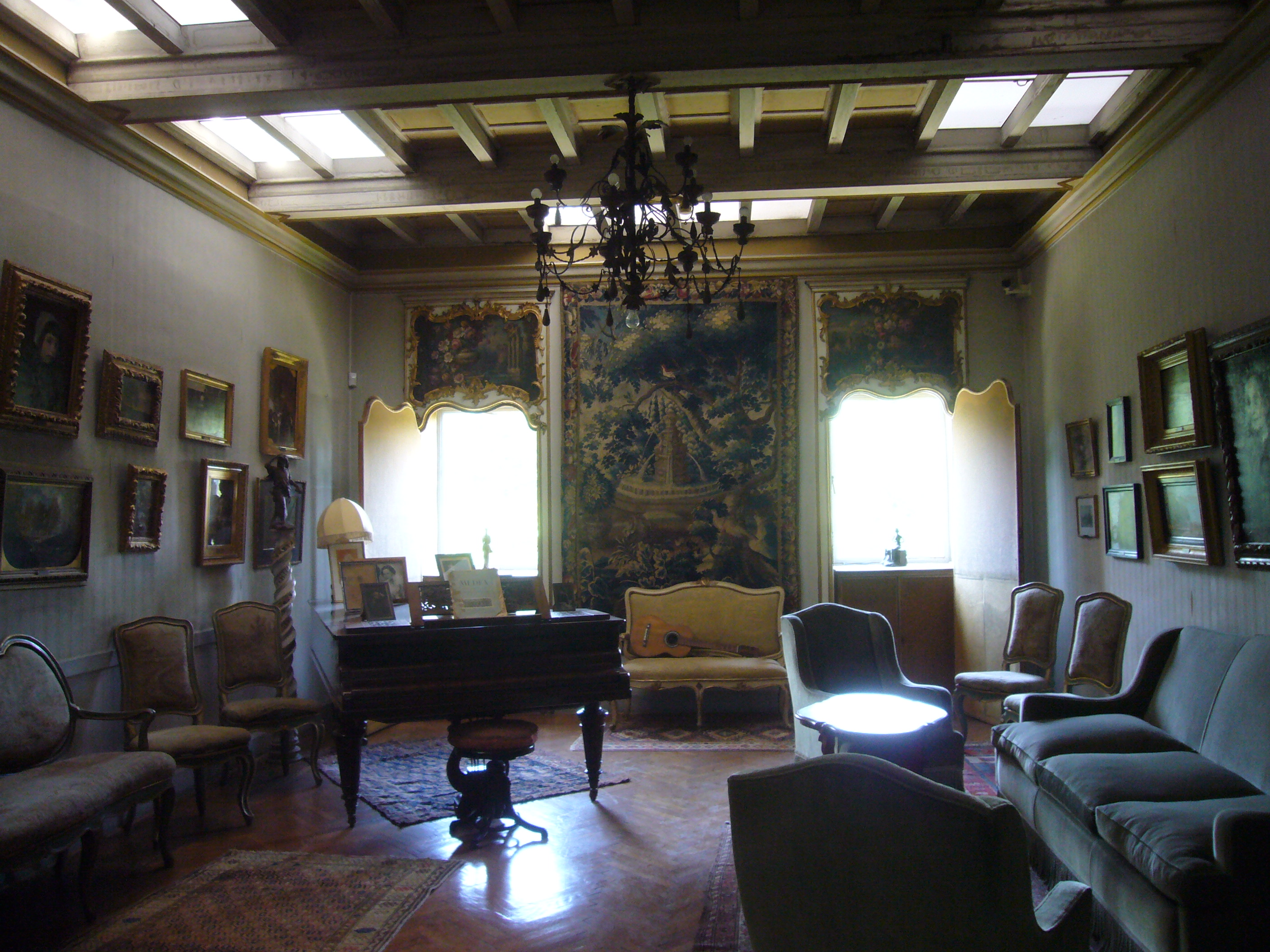 Roma, Museo Canonica a Villa Borghese. Appartamento dell'artista - sala da musica